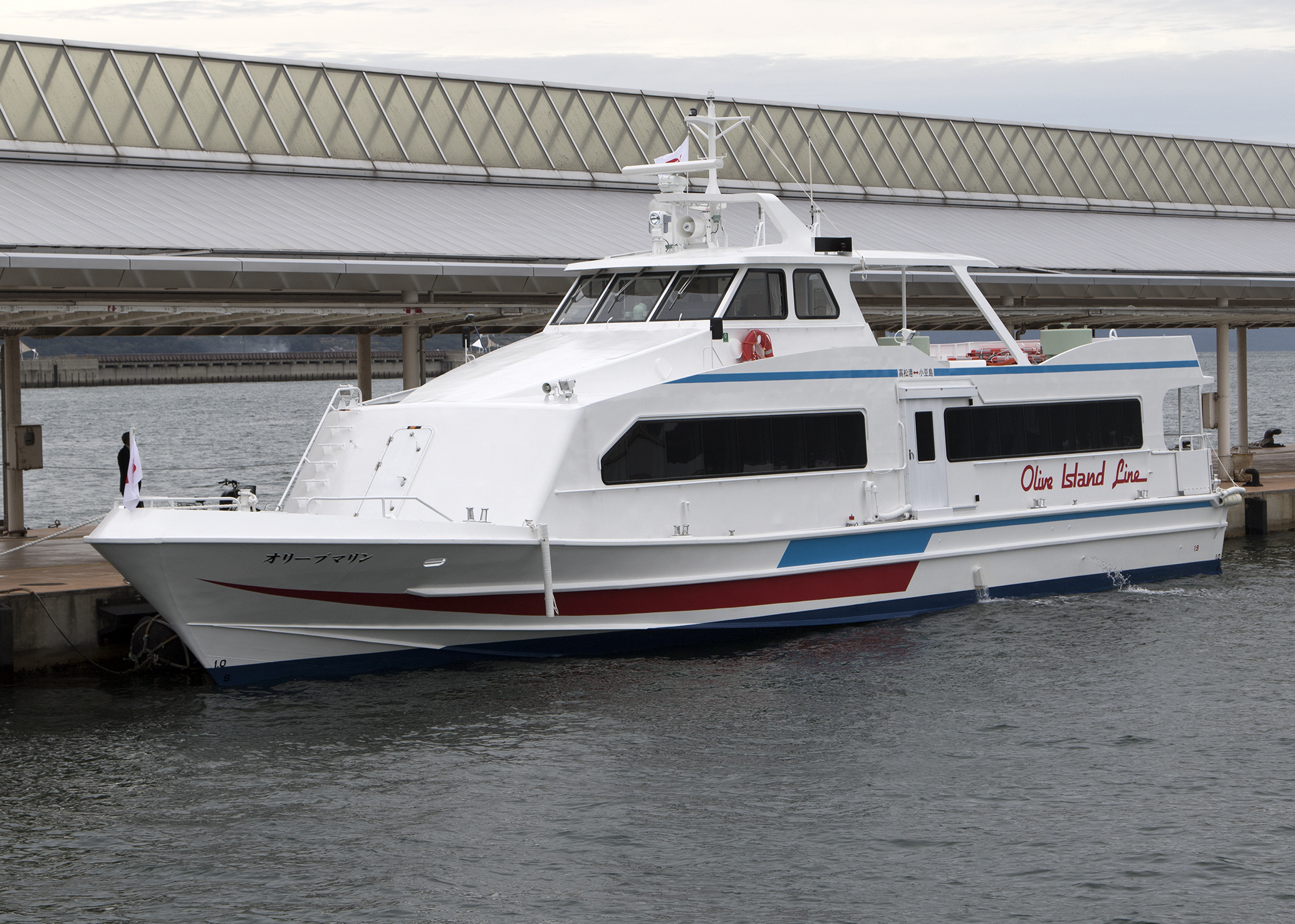 四国フェリー オリーブマリン （2015年就航）